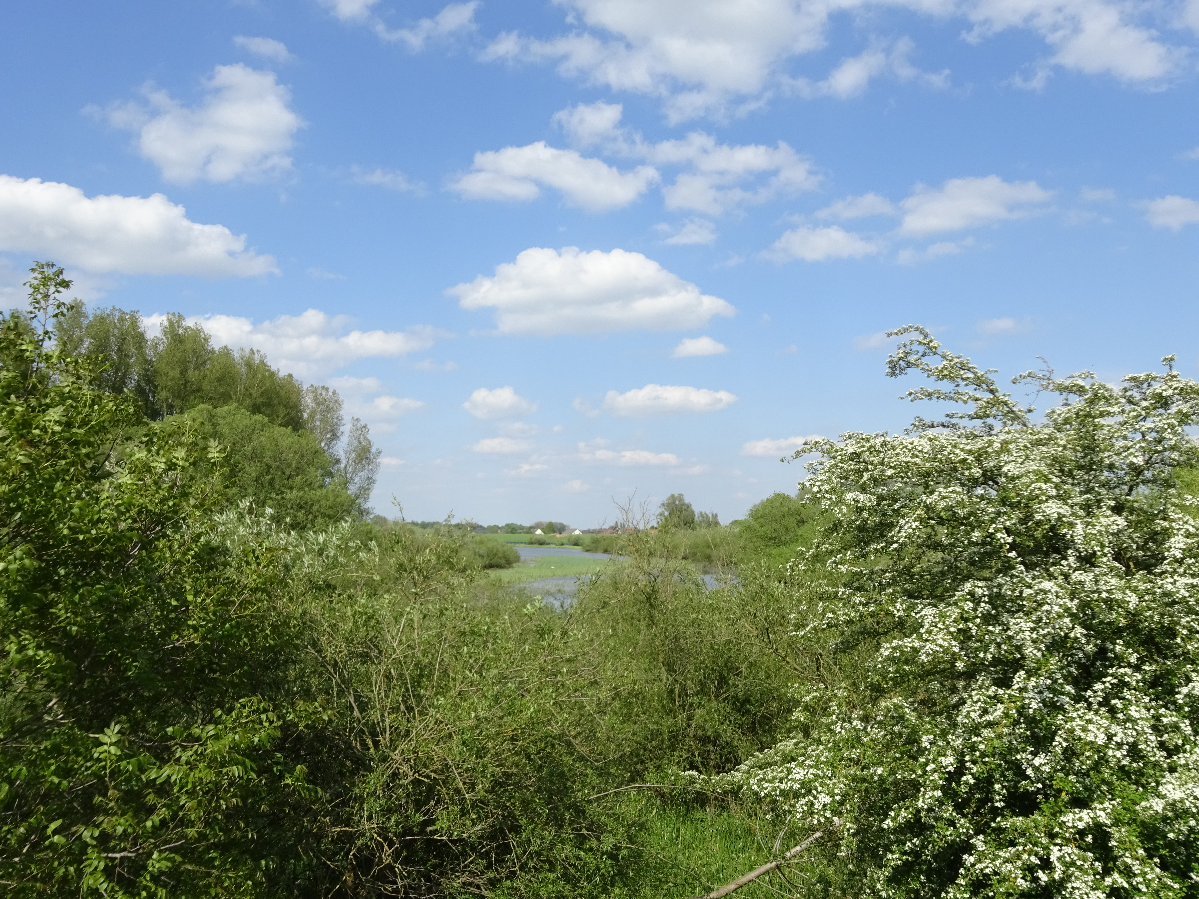 Rees-Bienen, NSG Bienener Altrhein an der Brücke Grietherbuscher Straße